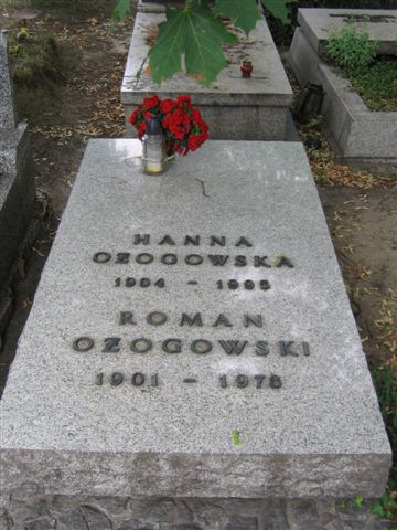 Hanna Ożogowska's monument (Powązki Cemetery; Cmentarz Komunalny, d. Wojskowy)